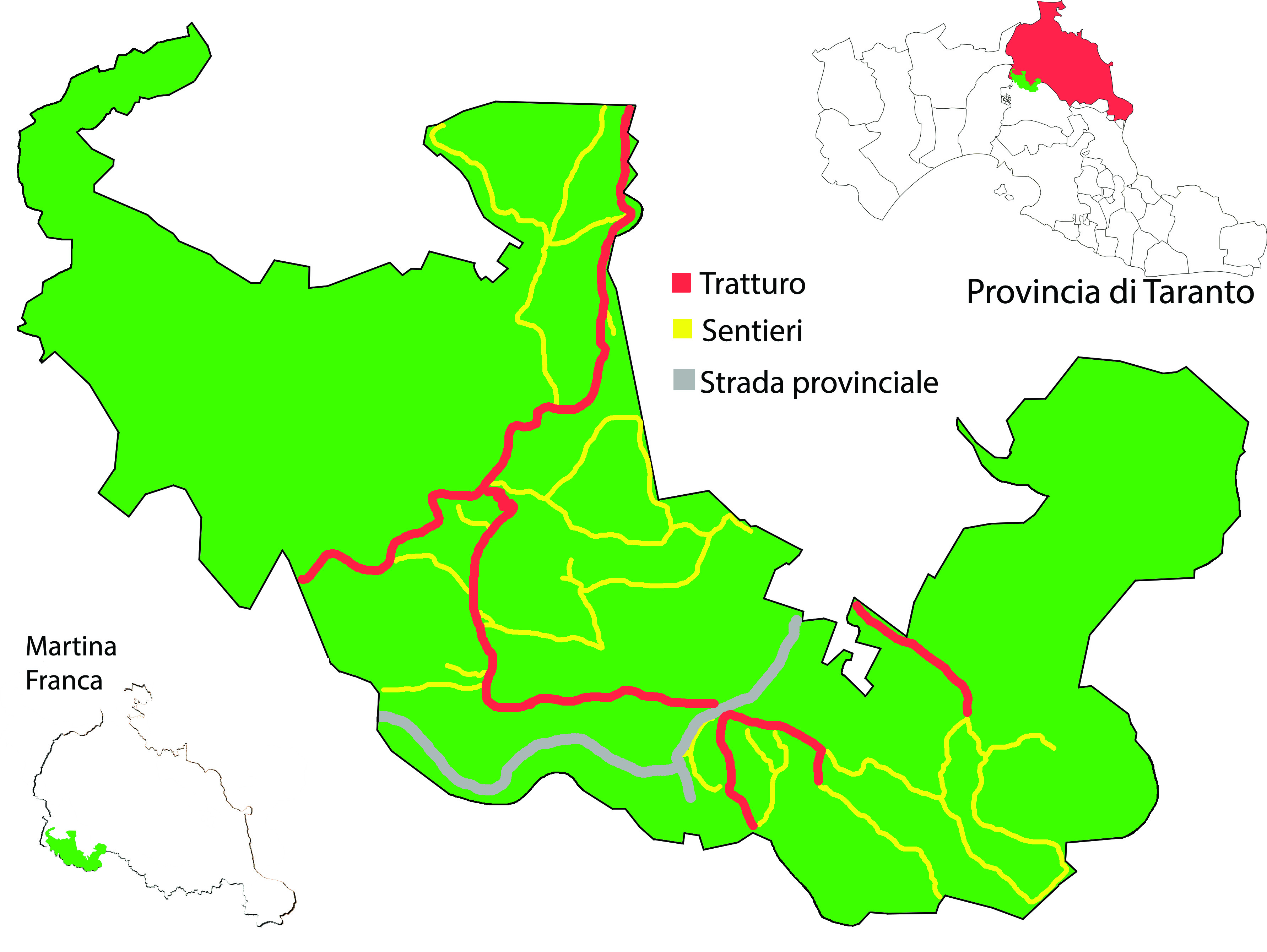 Mappa del Parco (regionale) Bosco delle Pianelle, a Martina Franca.